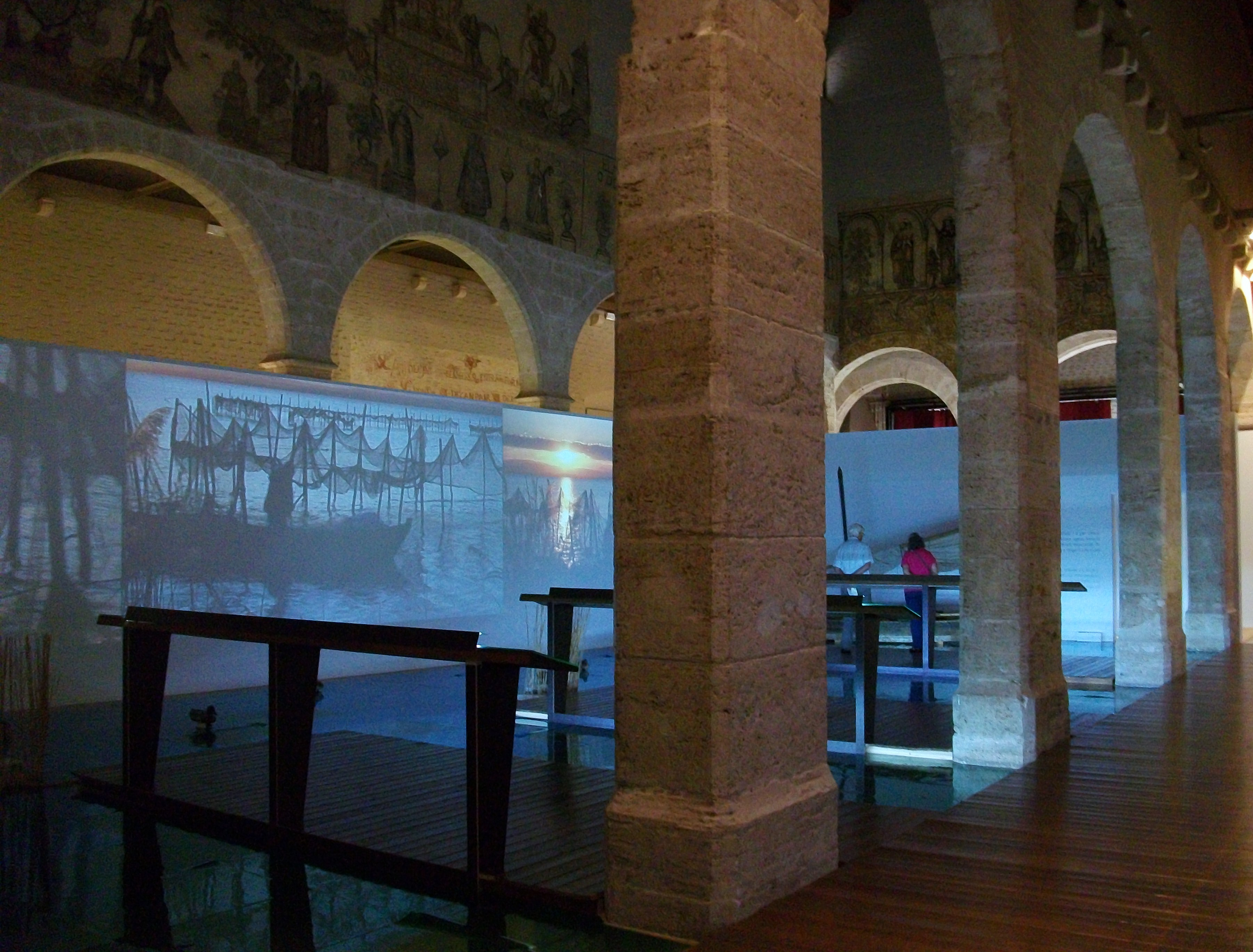 Interior de l'Almodí de València durant una exposició sobre l'Albufera de València.